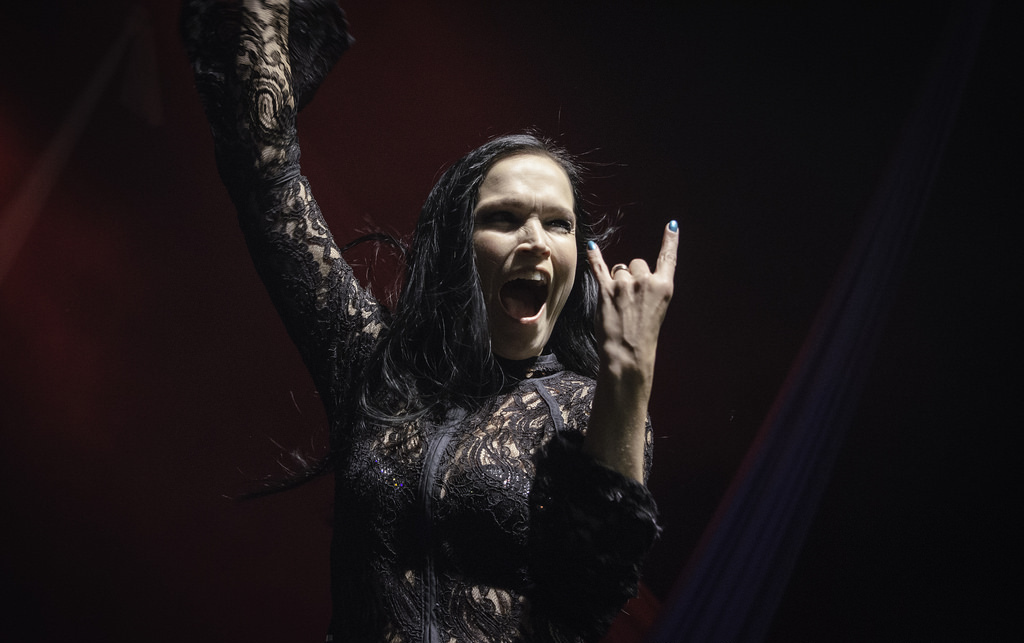 Tarja Turunen durante show em São Paulo